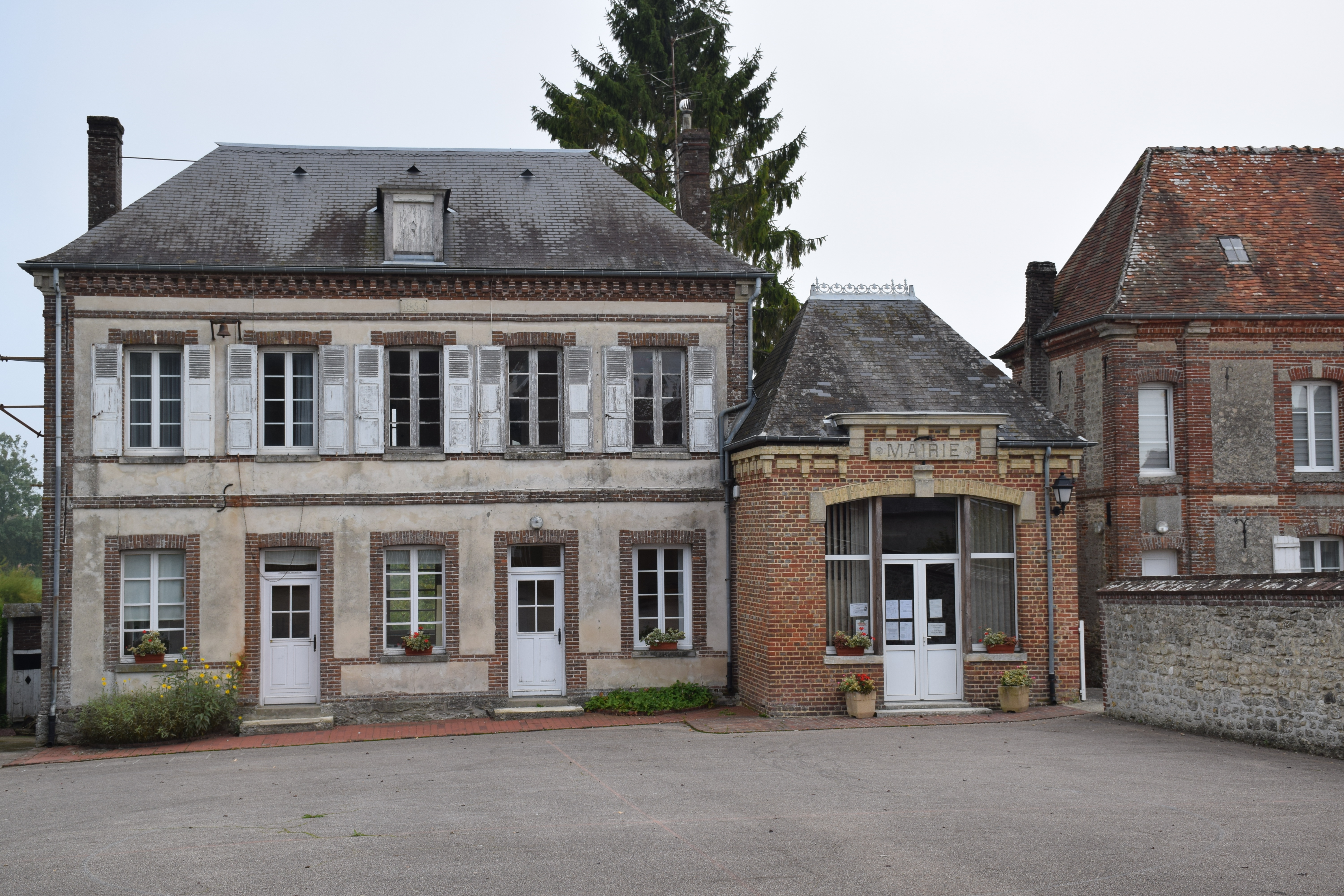 Mairie